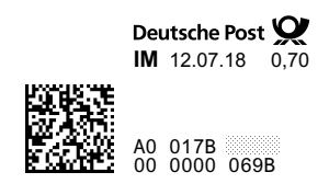 Internetmarke der Deutschen Post vom 12.07.2018